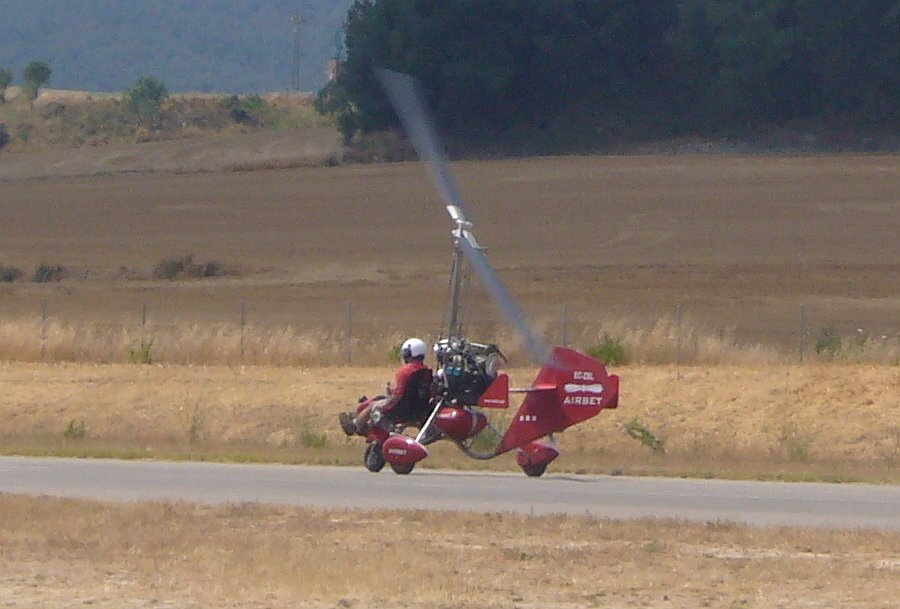 Autogir Airbet a l'aerodrom Igualada-Òdena